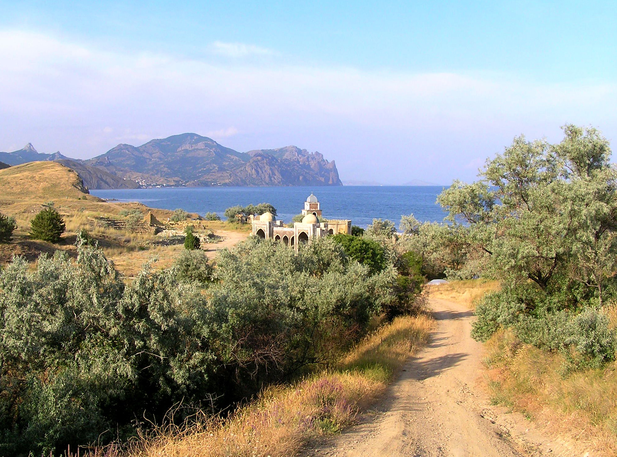 Регіональний ландшафтний парк «Лисяча бухта Ечкі-Даг» АР Крим.